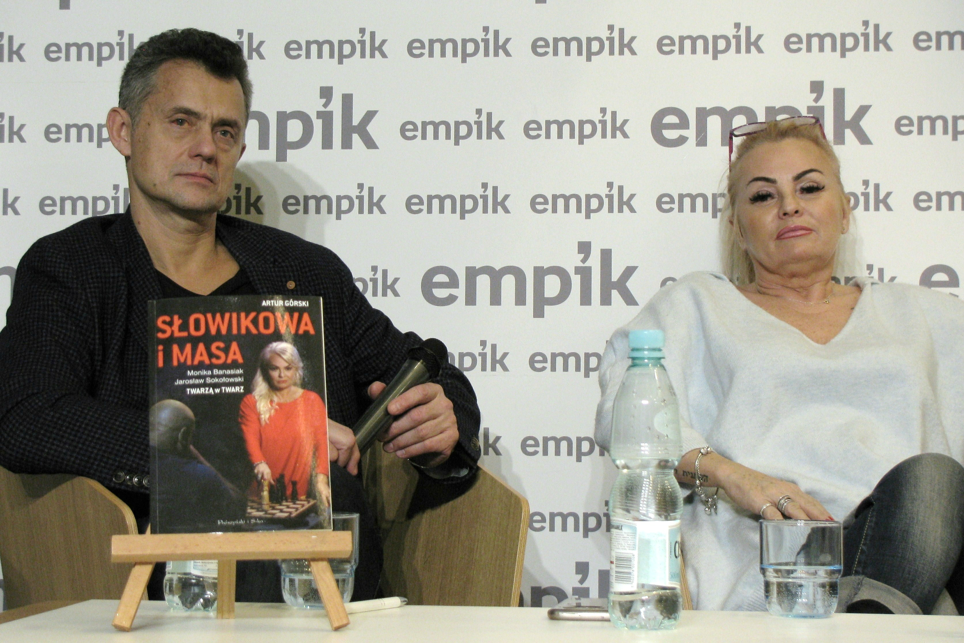 Dziennikarz Artur Górski i Monika Słowikowa Banasiak.